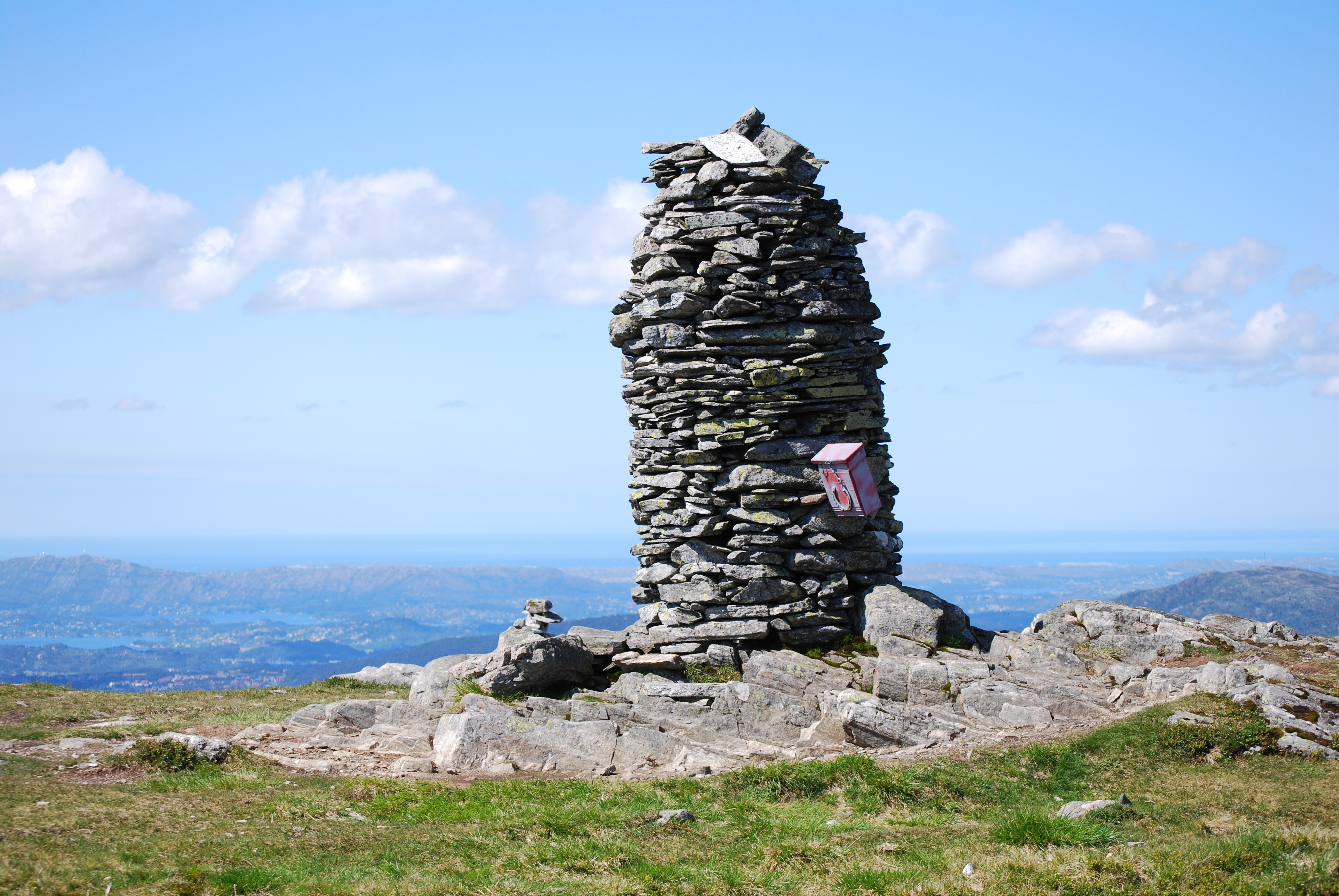 Description=Nordvarden på Livarden